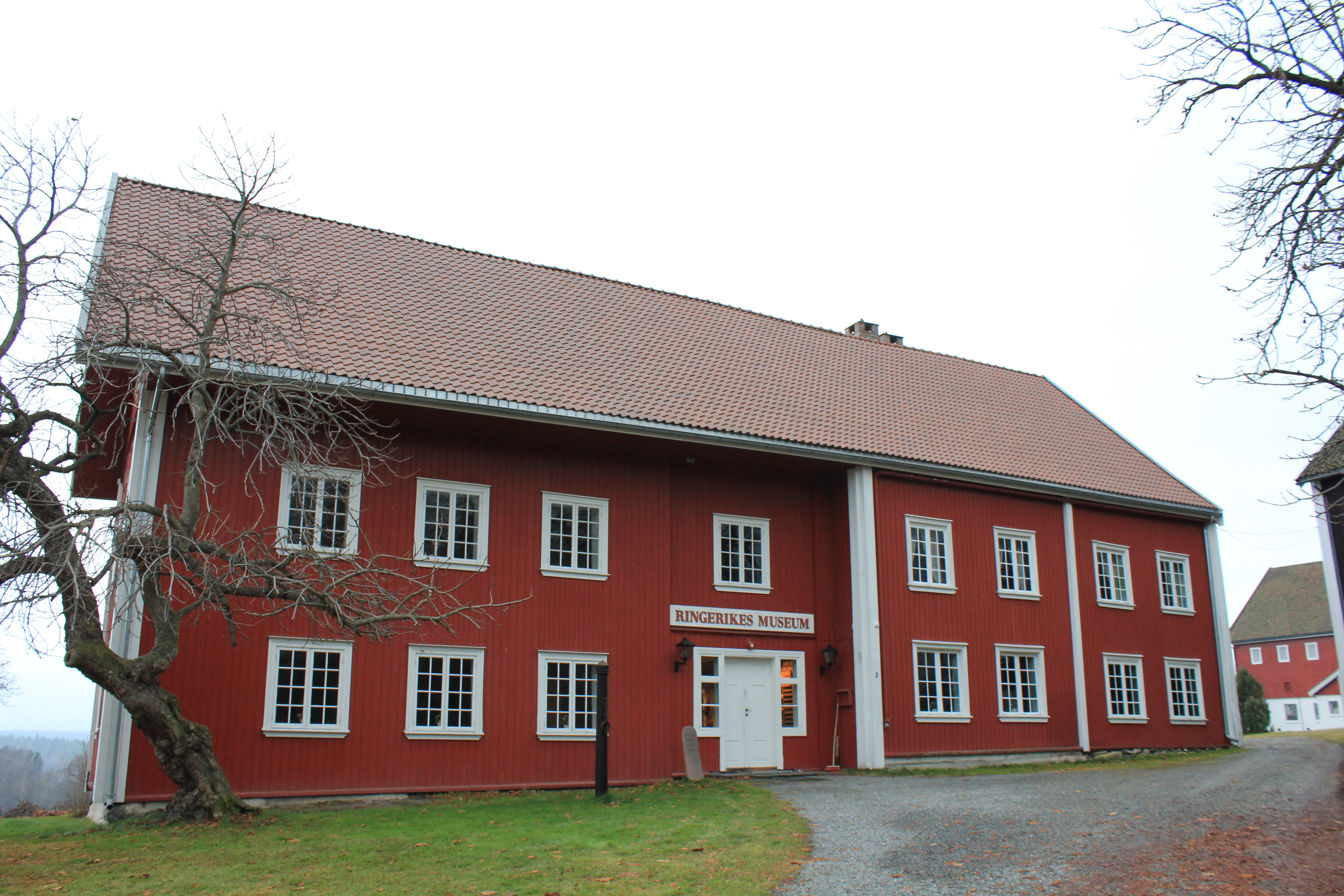 Ringerikes museum.